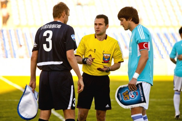 Капитан команды «Ротор» Николай Олеников (слева), судья Евгений Турбин и капитан команды «Волгарь» Роман Локтионов перед матчем